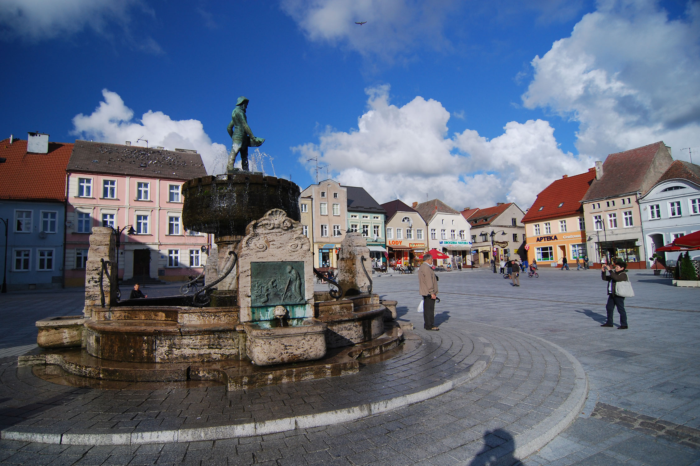 Renovierter Marktplatz von Darłowo mit Hansabrunnen